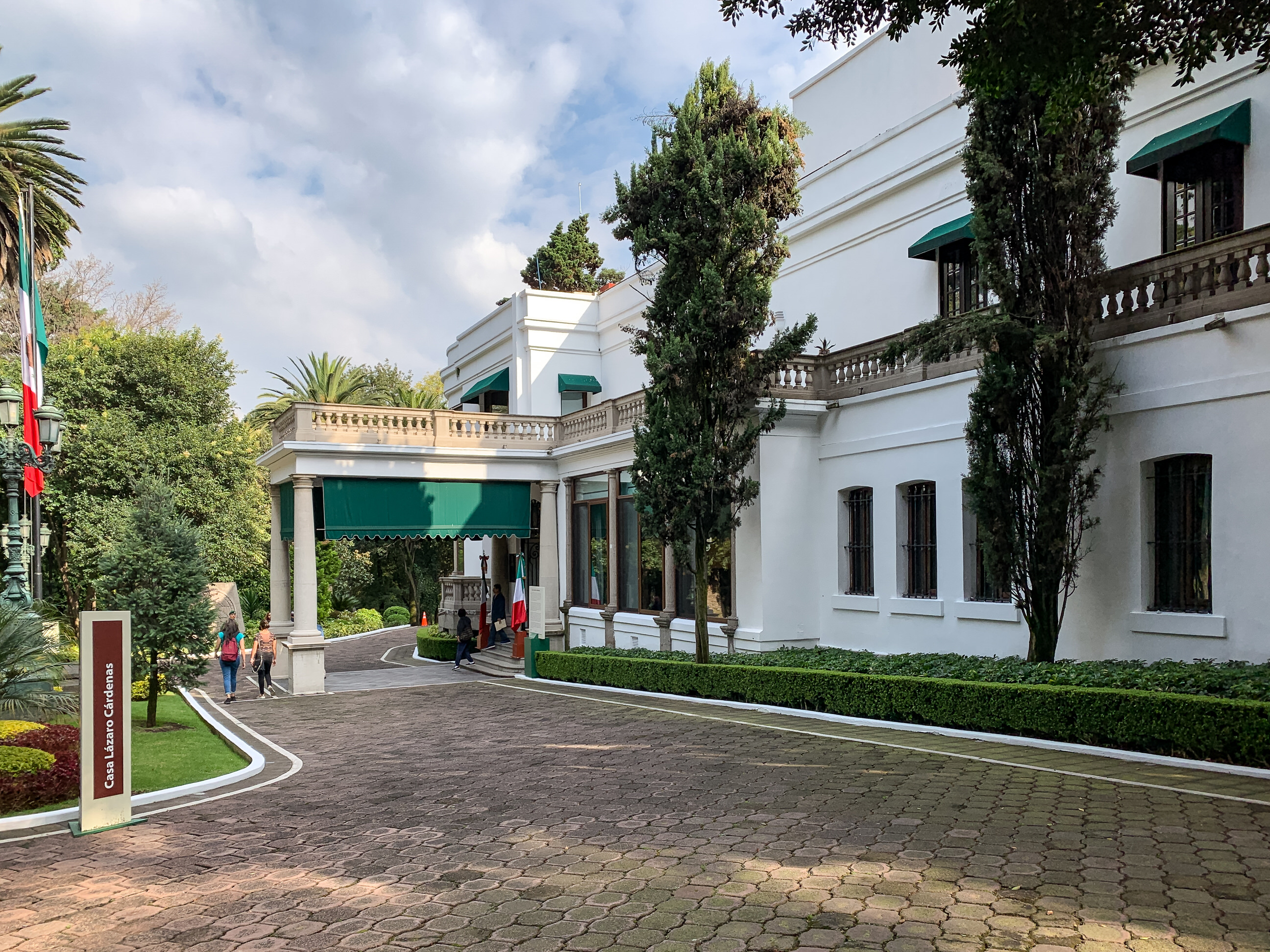 Casa de Lazaro Cardenas en Los Pinos